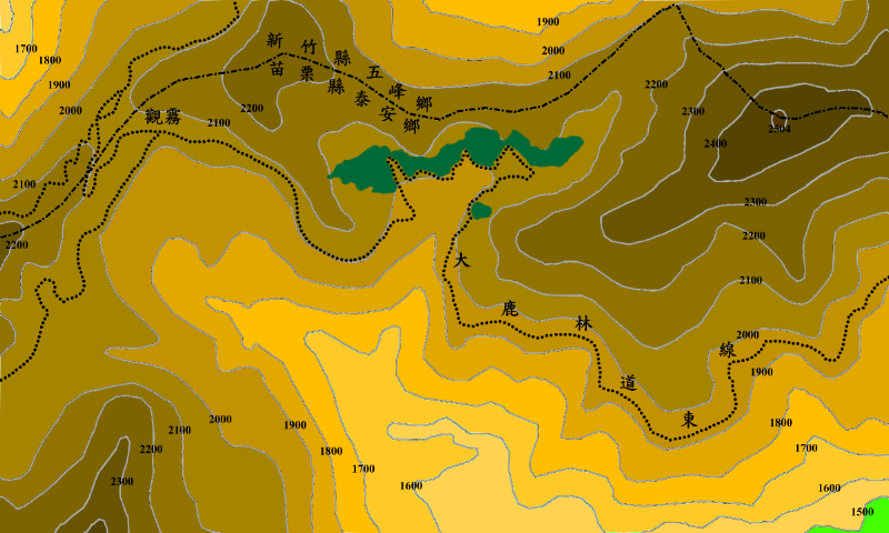 本圖依 觀霧台灣檫樹自然保護區植物相研究 圖三、圖六以及Google地圖等圖資 重繪而成